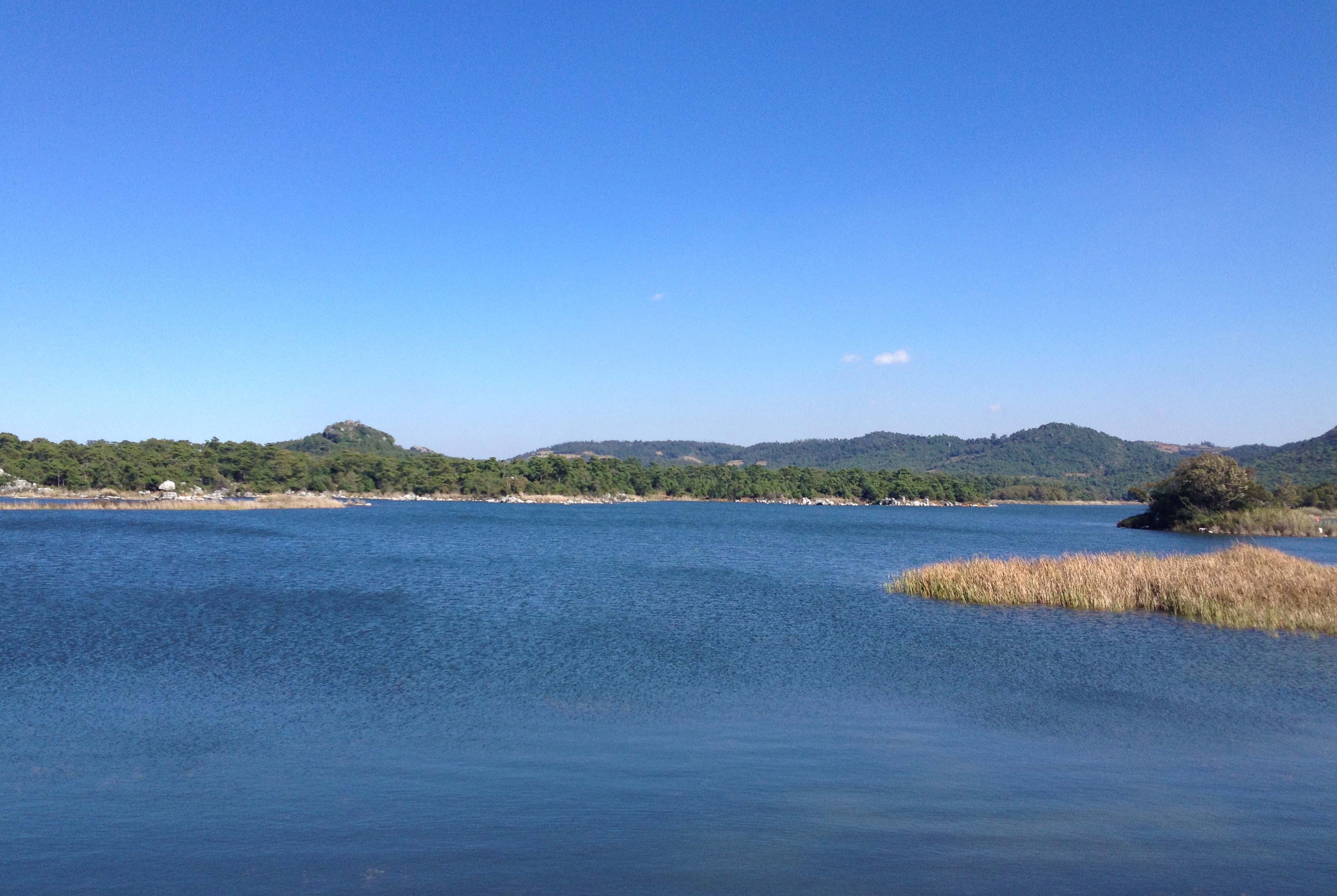 云南石林县境内的长湖，属于石林（省级）自然保护区的一部分。